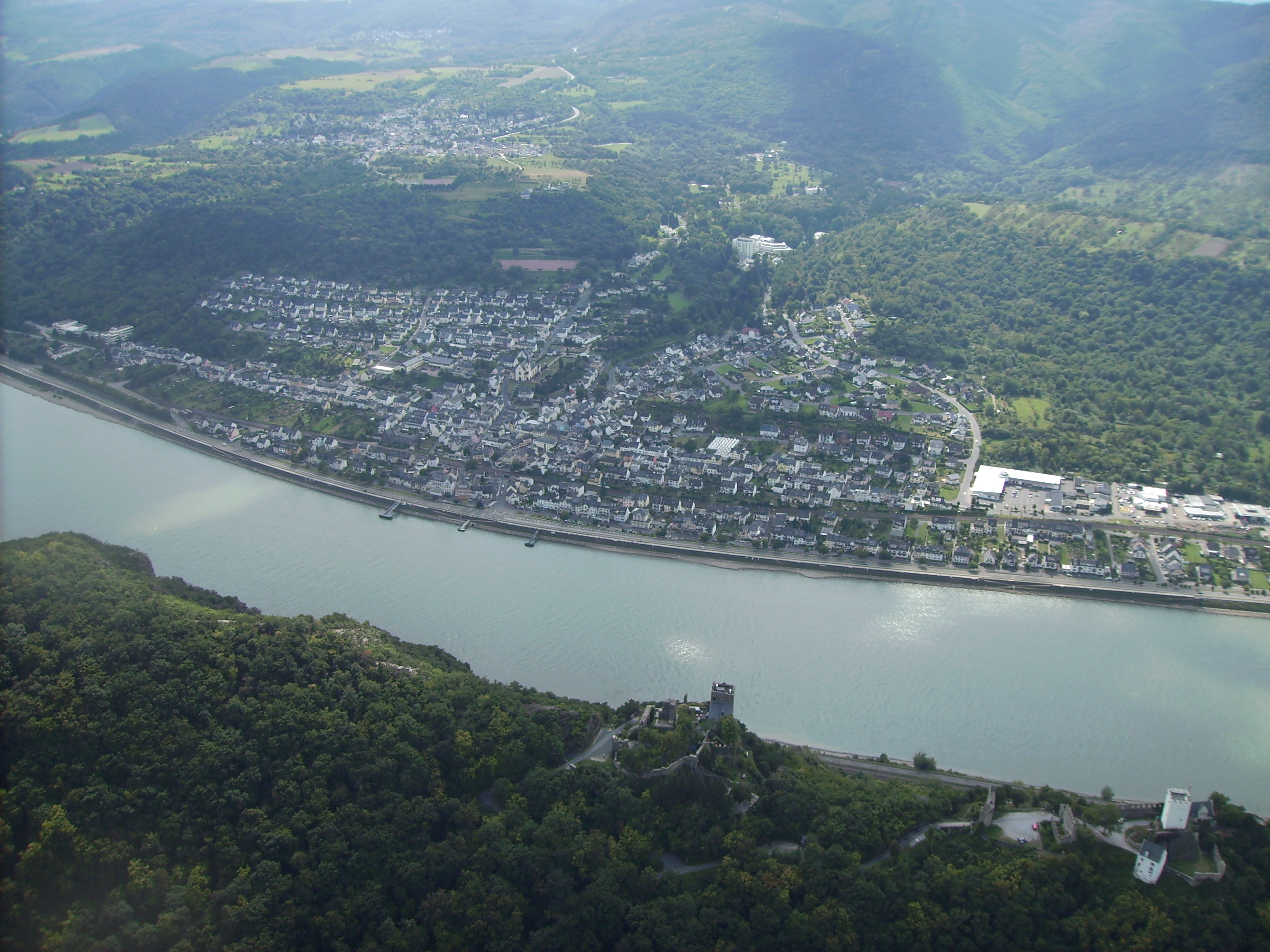 Bad Salzig am Rhein am 26.08.2009, fotografiert während eines Helikopter-Rundfluges